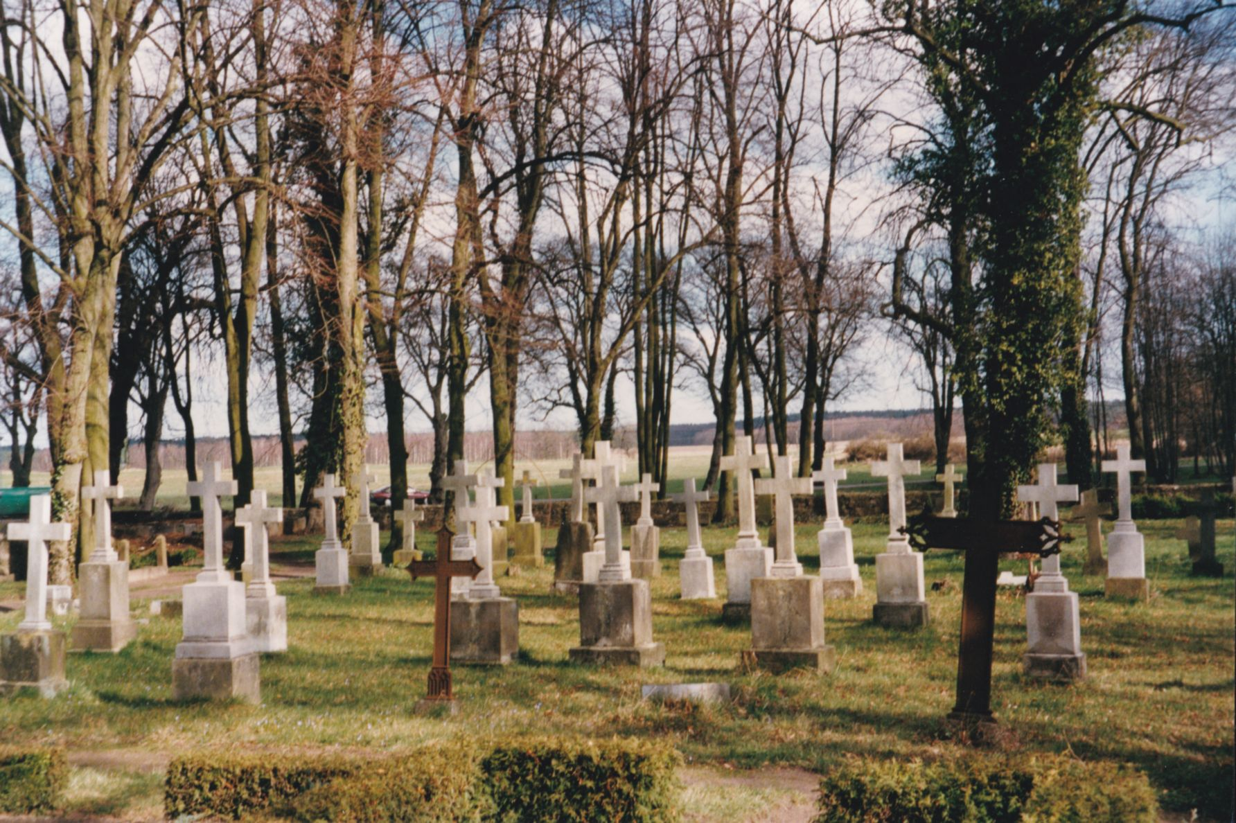 Grabkreuze der Konventualinnen des Klosters Dobbertin auf dem Klosterfriedhof